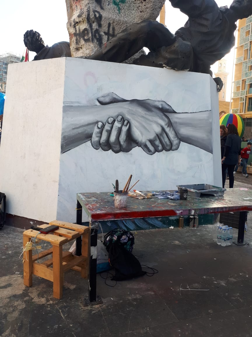 Kunstaktion auf dem Beruter Märtyrerplatz